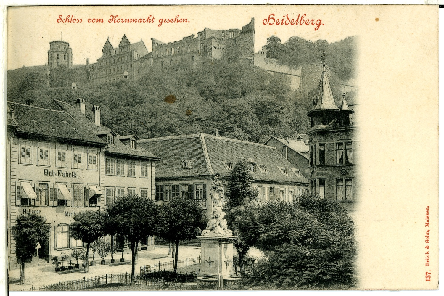 Heidelberg; Schloß vom Kornmarkt gesehen This postcard is from publisher Brück & Sohn in Meißen ( This postcard has a unique number 00137 and is available in a higher resolution at the publisher. This images was uploaded in a cooperation project between Wikipedians and the publisher.